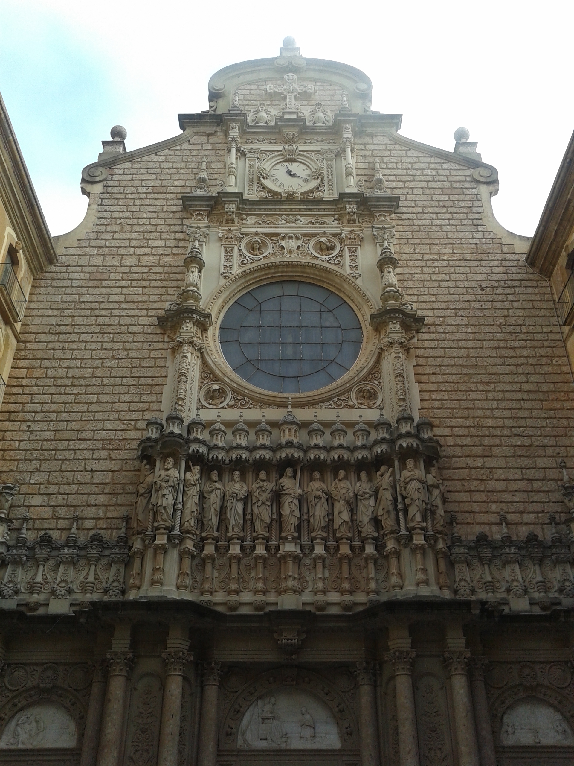 Մոնսերրատի աբբայություն_բազիլիկ